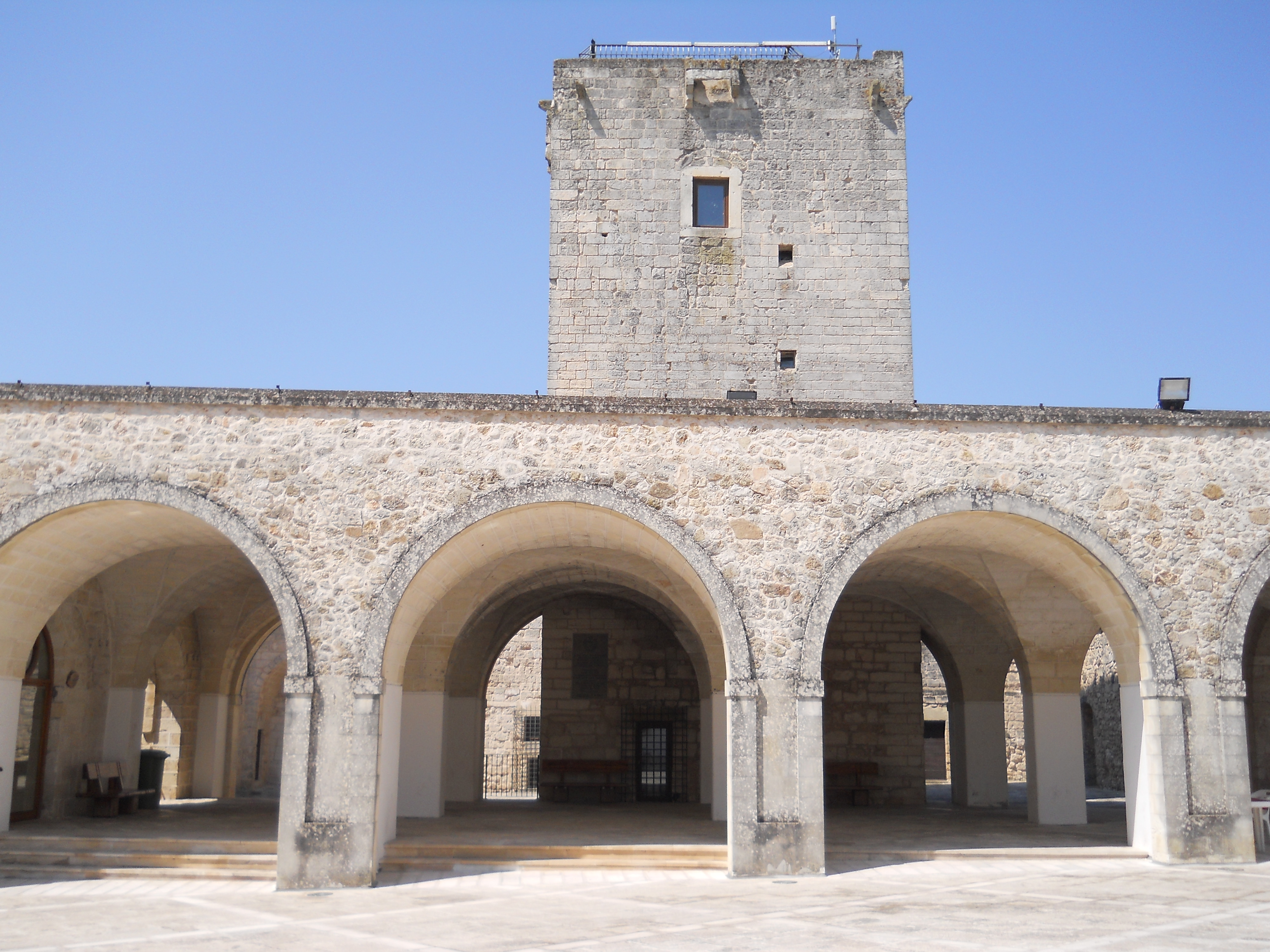 Nociglia